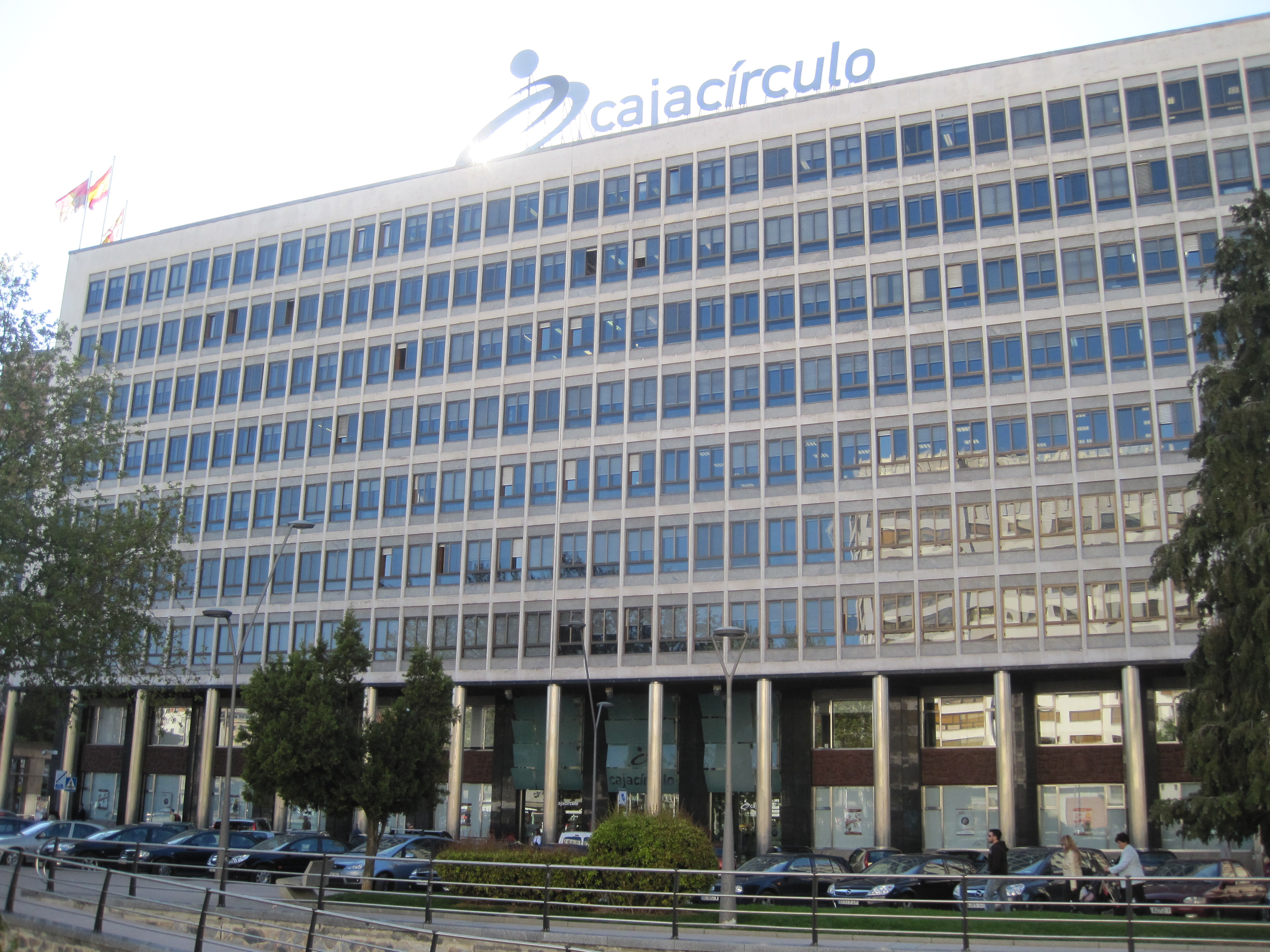 Vista frontal externa de una de las cajas de Burgos.